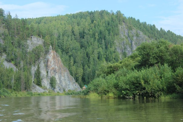 Шорский, Таштагольский район This image is related to the protected area of Russia number 4200024